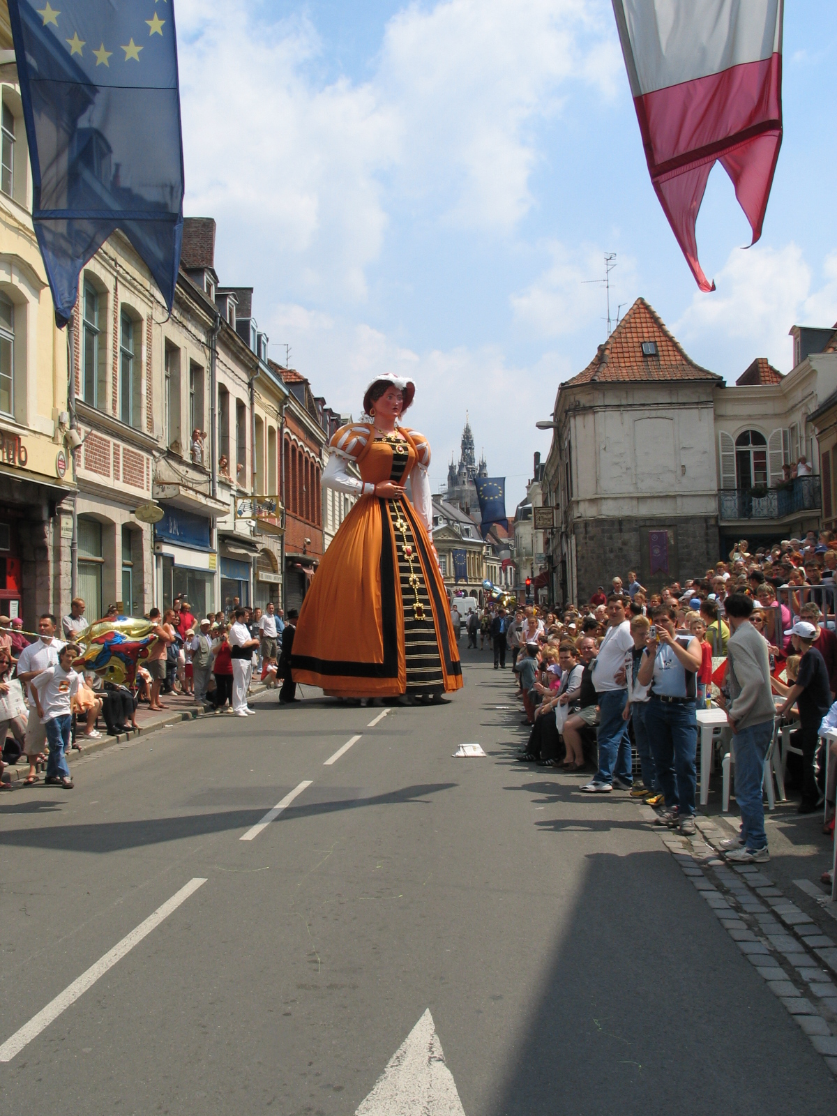 De reuzin Marie Cagenon, de wederhelft van Gayant in Douai